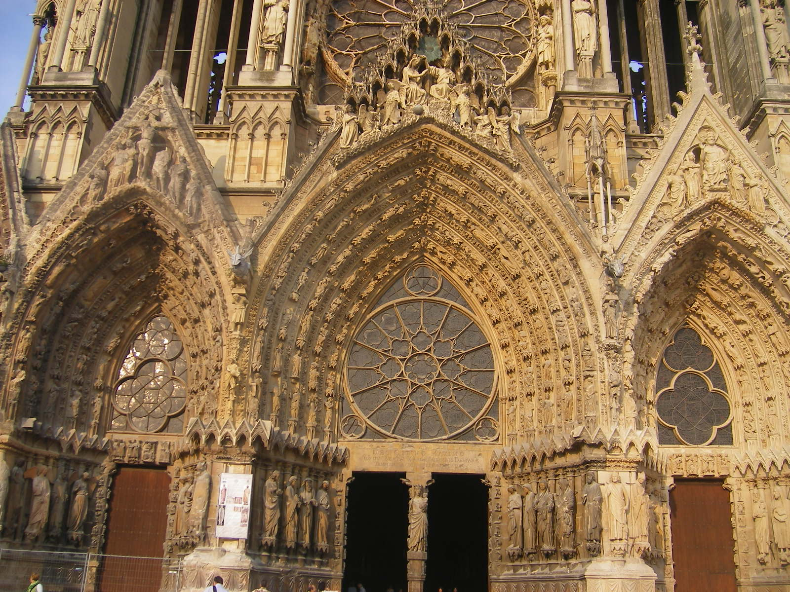 Cathédrale Notre-Dame de Reims